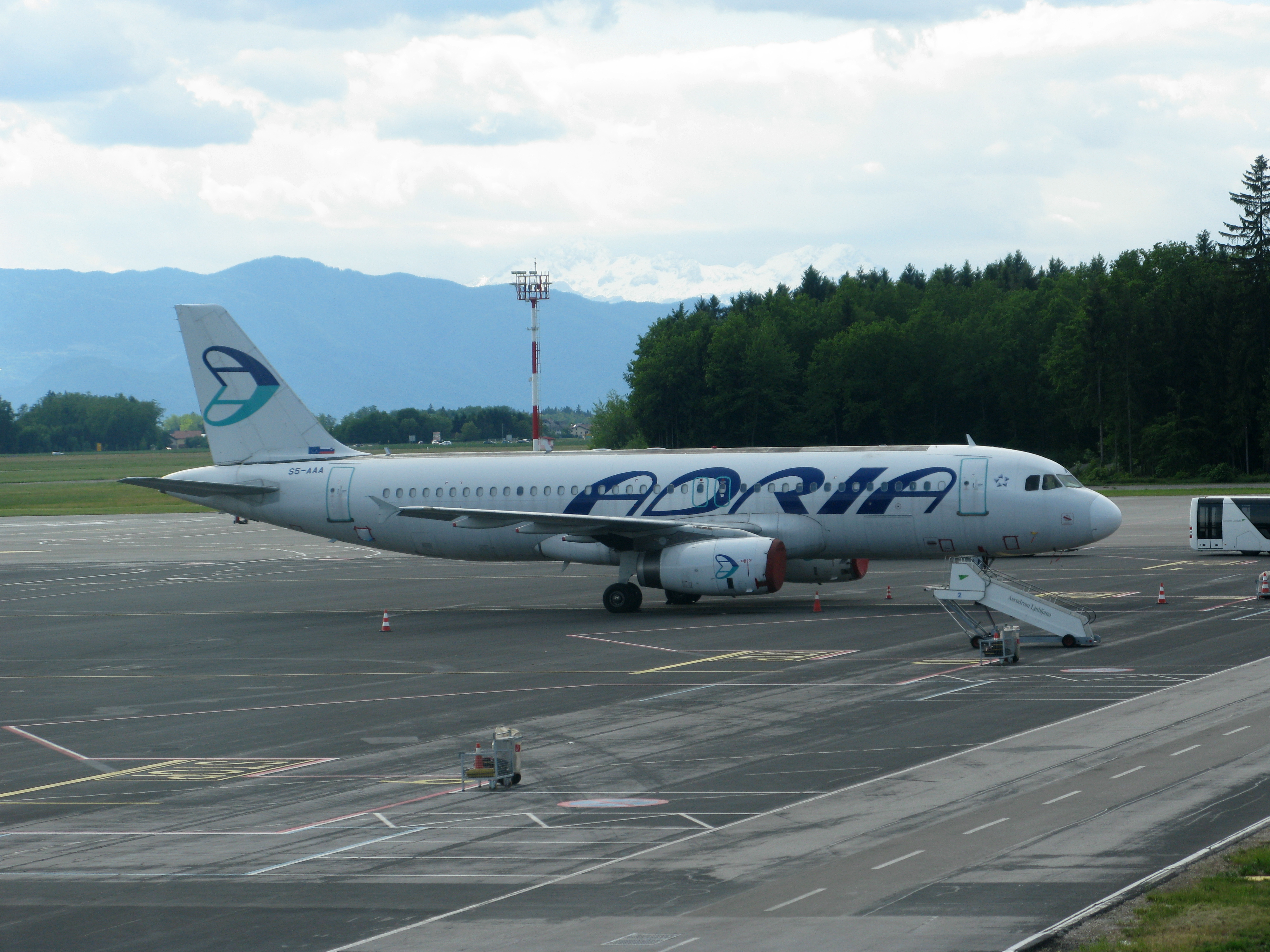 Adria Airbus A-320